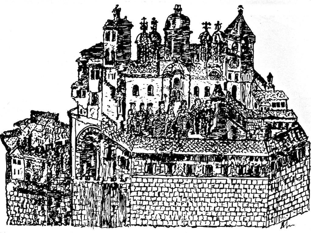 Μονή Αγίου Διονυσίου στον Όλυμπο (1542). Γκραβούρα της μονής